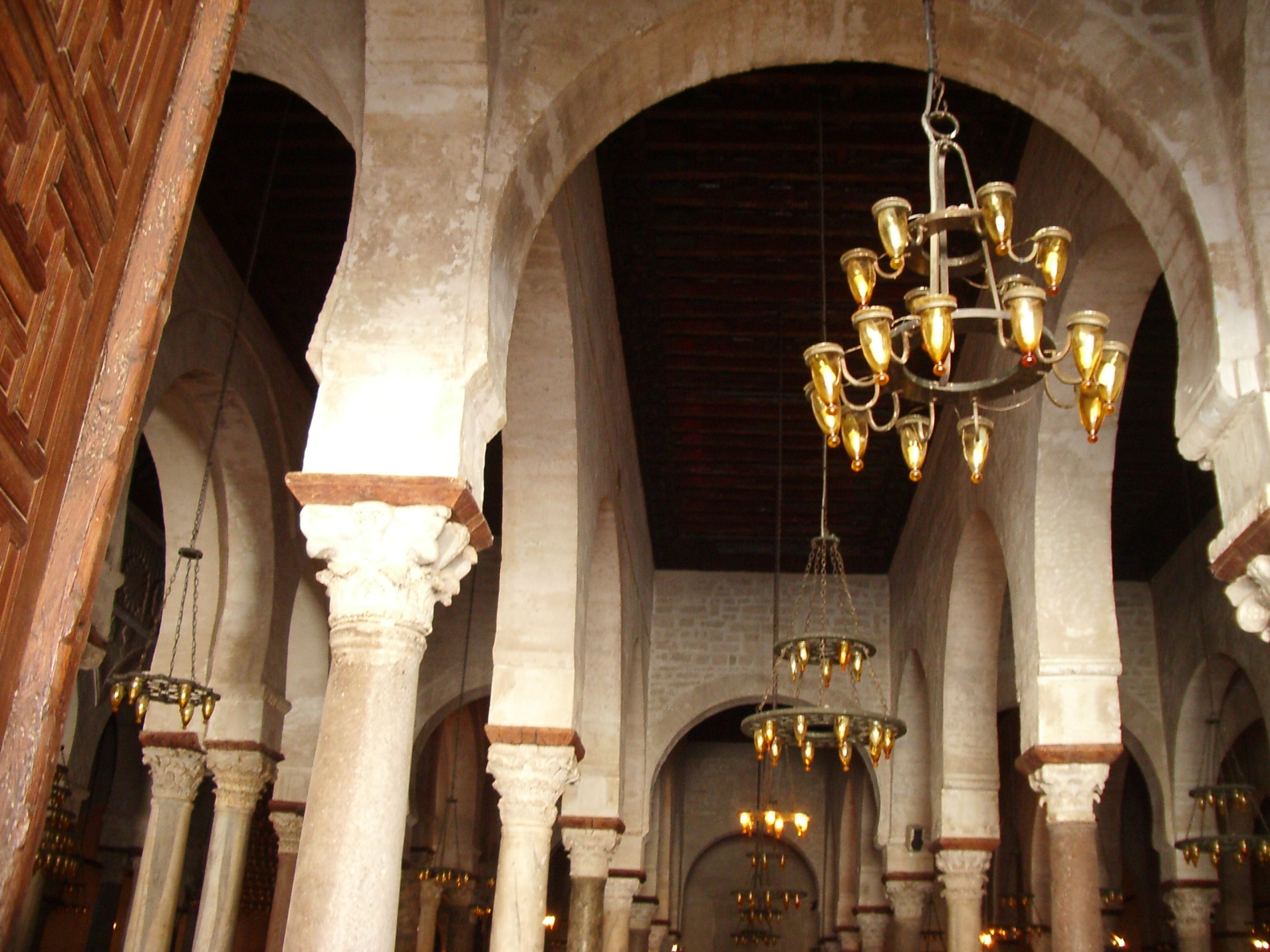 Gran mesquita de Kairuan